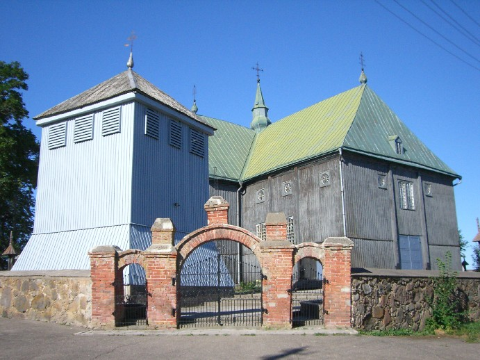 Sedos Švč. Mergelės Marijos Ėmimo į dangų bažnyčia (2006m.)